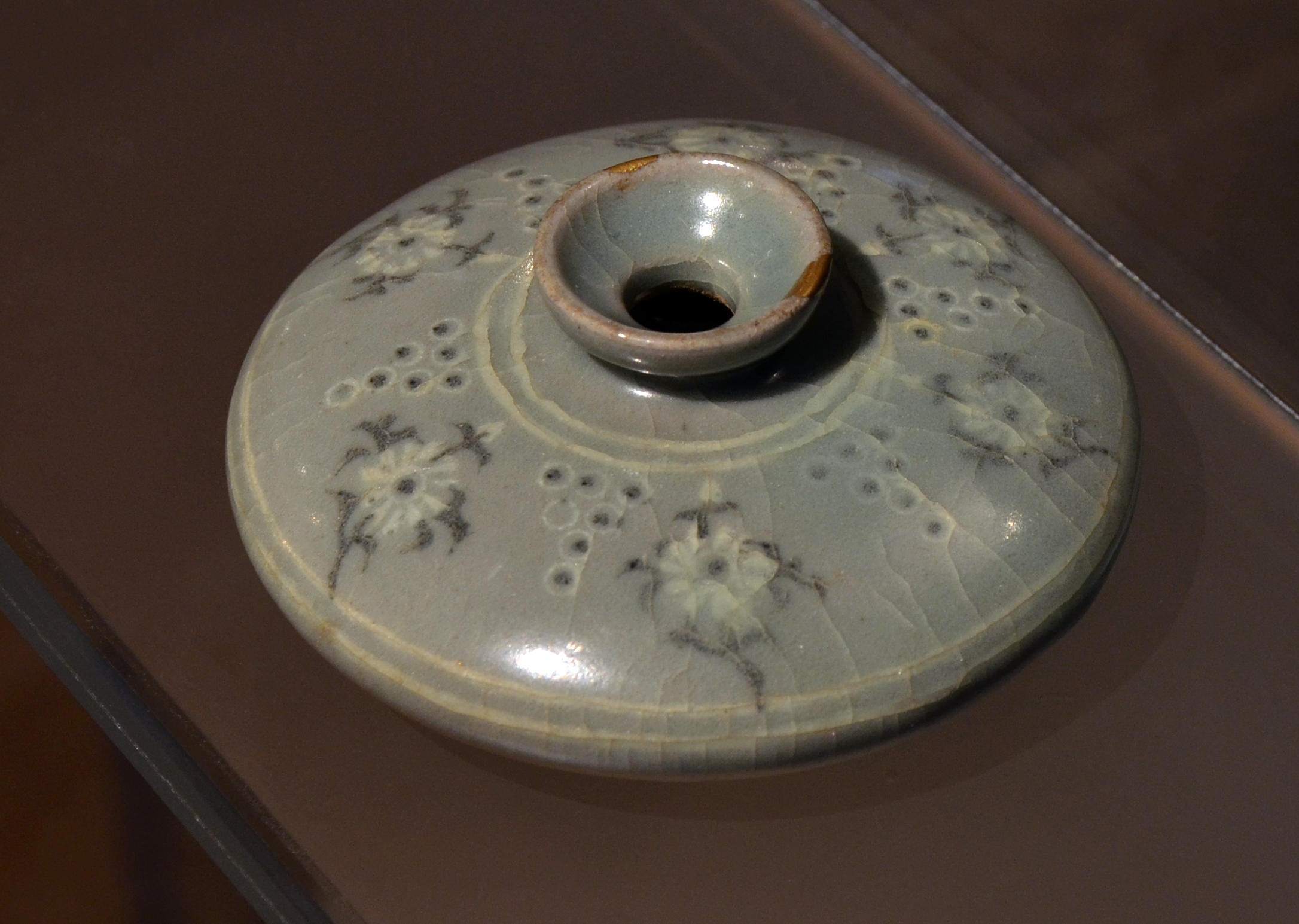 Ölflasche mit eingelegtem Chrysanthemendekor. Steinzeug mit Seladondekor. Korea, Goreyo-Periode, 13. Jh. Museum für Ostasiatische Kunst, Köln.